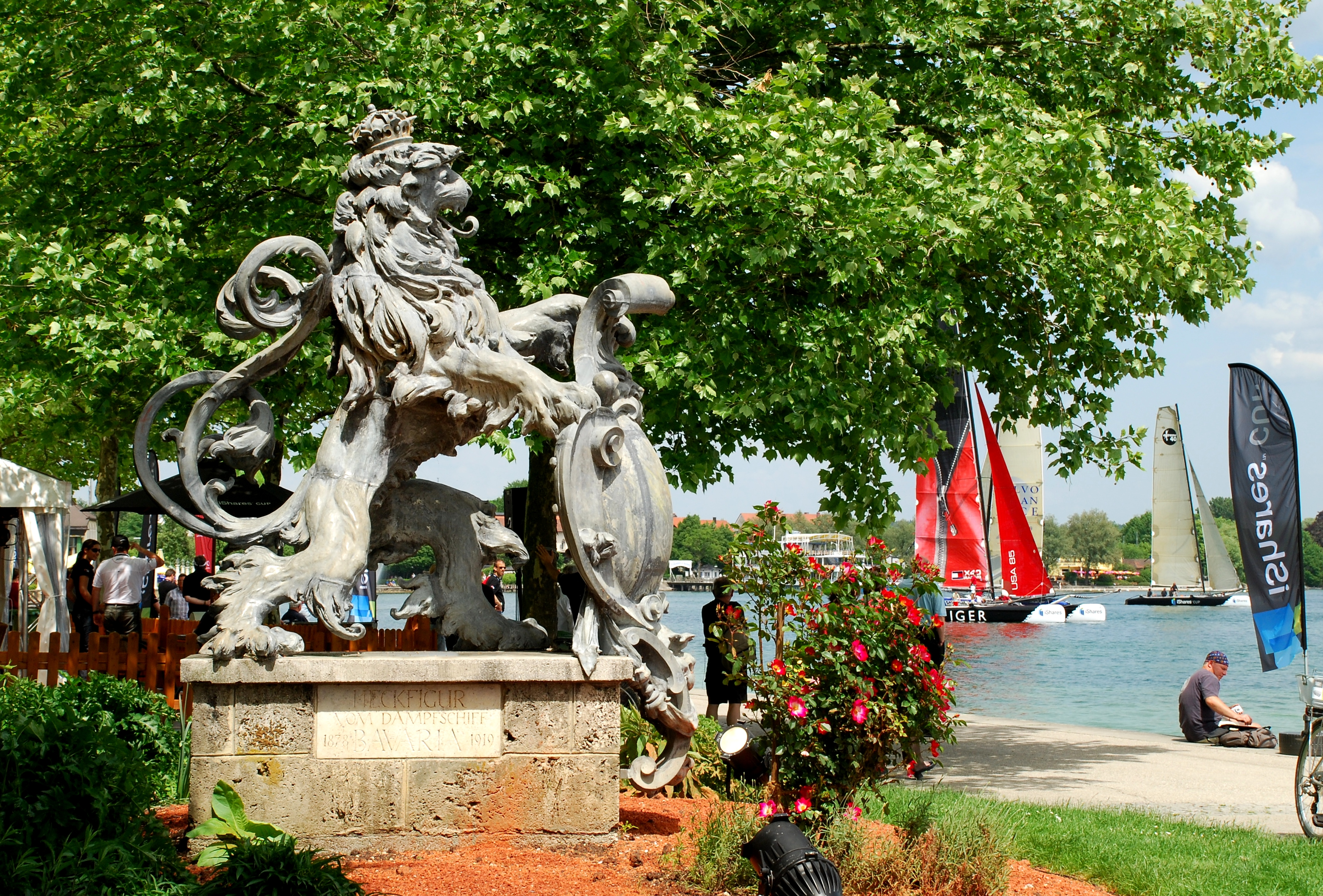 Bayerischer Löwe von Lorenz Gedon um 1878. Heckfigur des ehemaligen Dampfschiffes "Bavaria", nach 1919 an der Seepromenade aufgestellt.